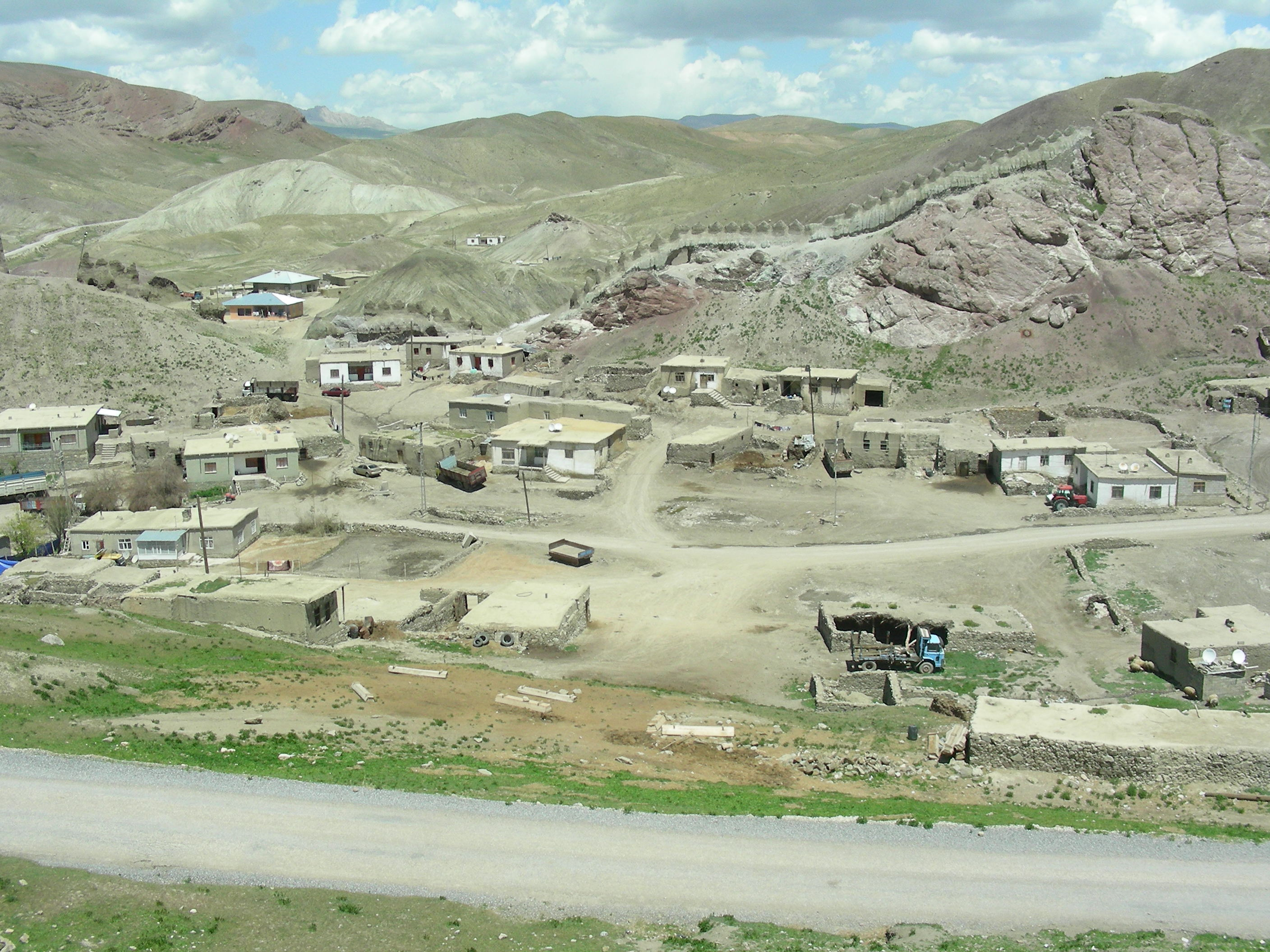 Güzelsu